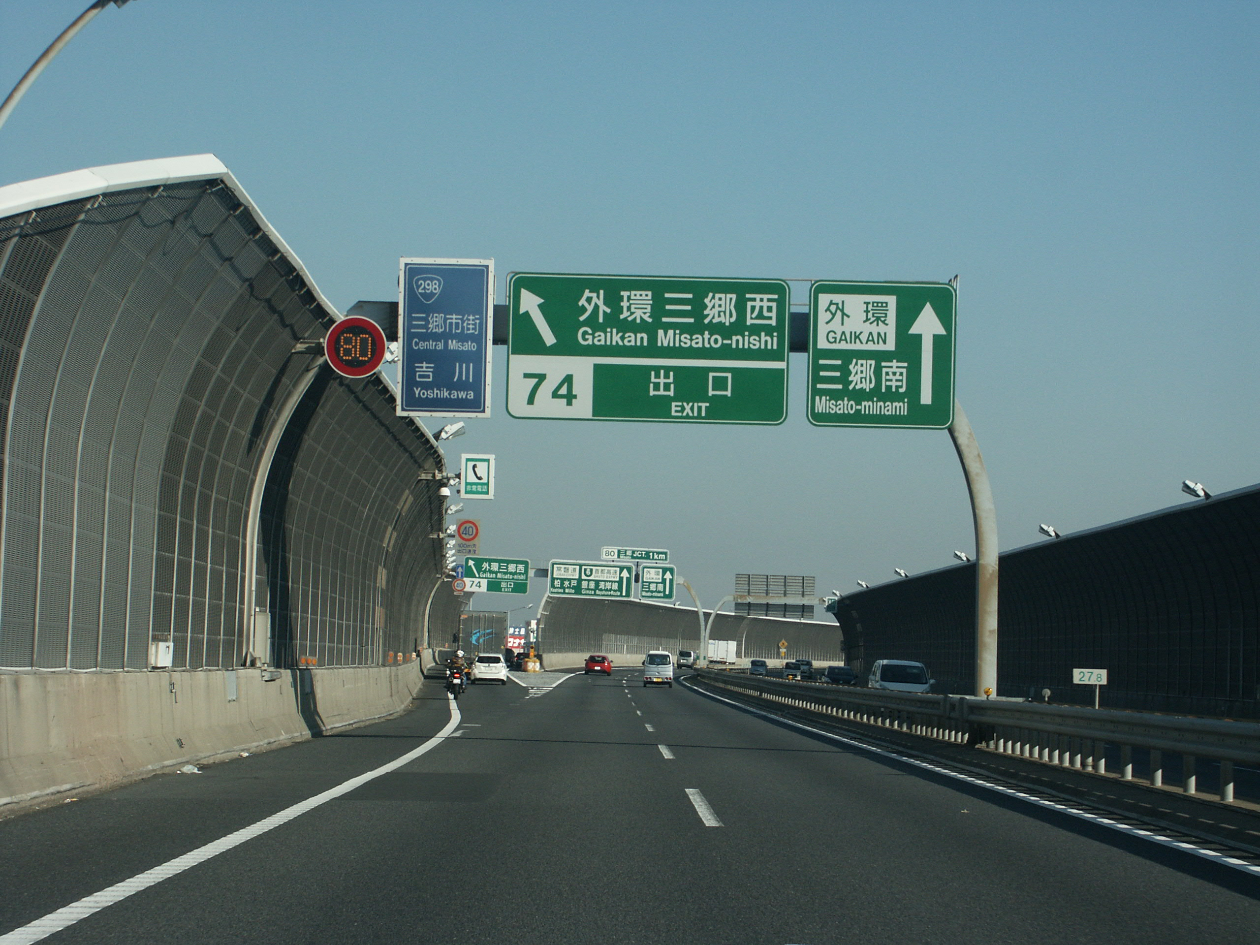 東京外環自動車道外環三郷西出口付近